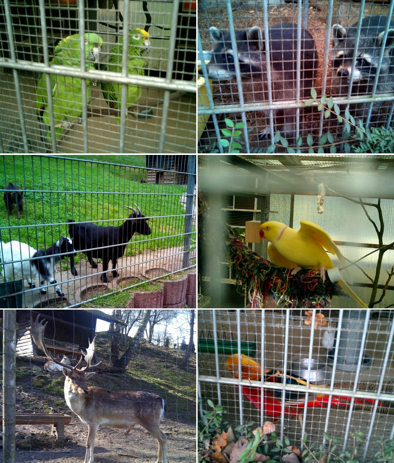 Ein Mosaik der Tiere des Parks